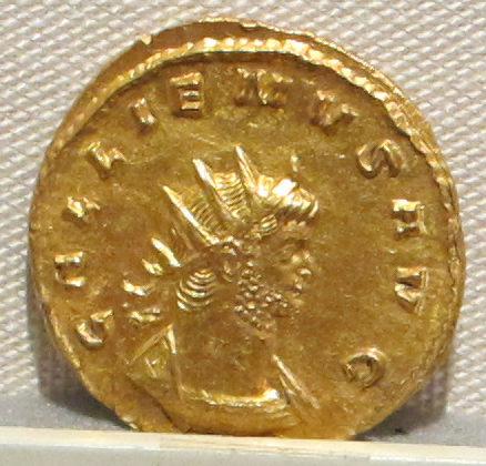 Palazzo Massimo alle Terme